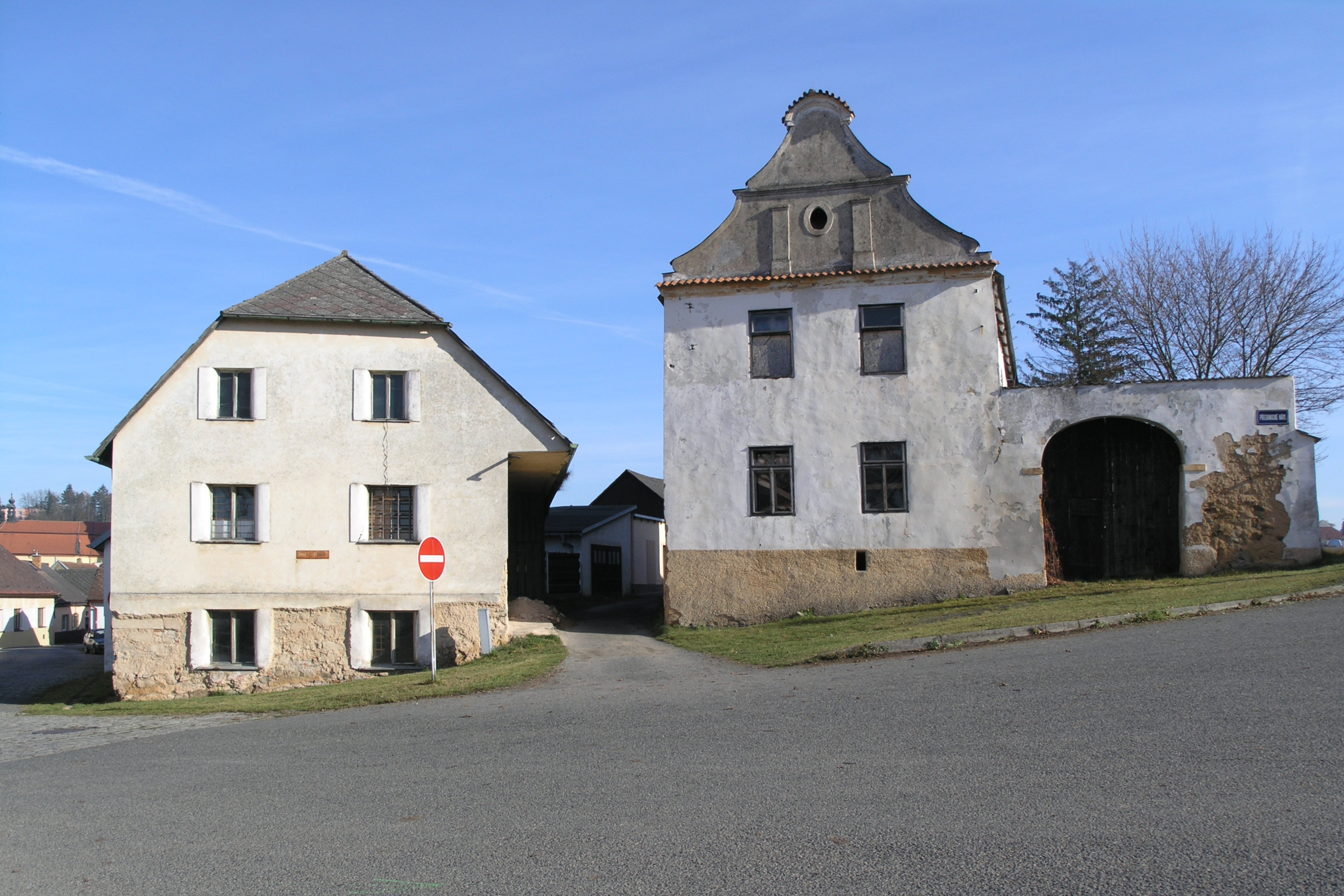 Nepomuk